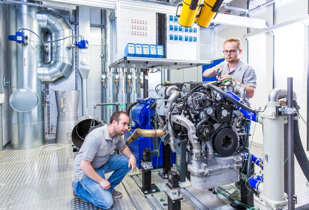 Motorenprüfstand NFF-Forschungsneubau in Braunschweig